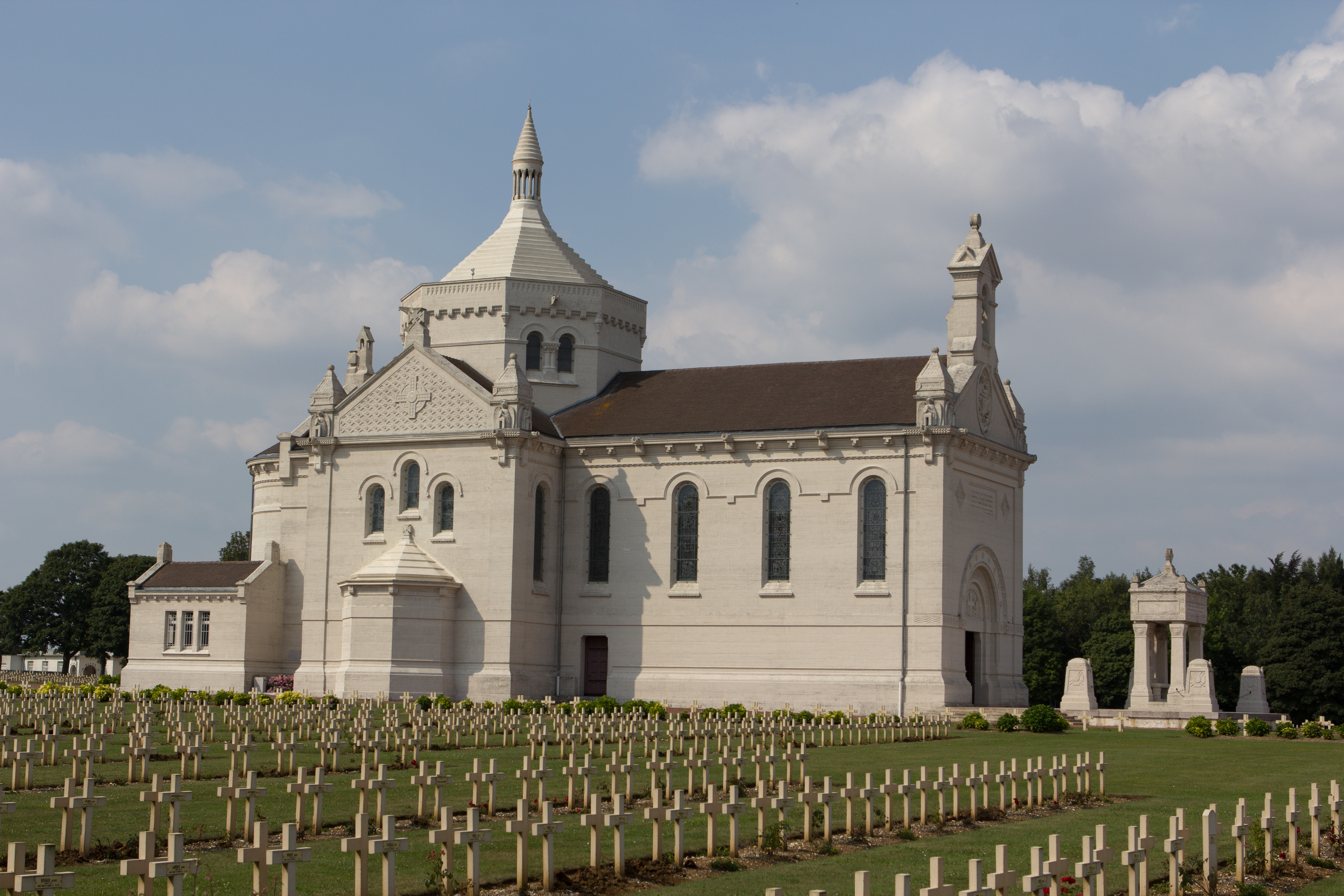 Nécropole nationale de Notre-Dame-de-Lorette / Ablain-Saint-Nazaire, Pas-de-Calais, France